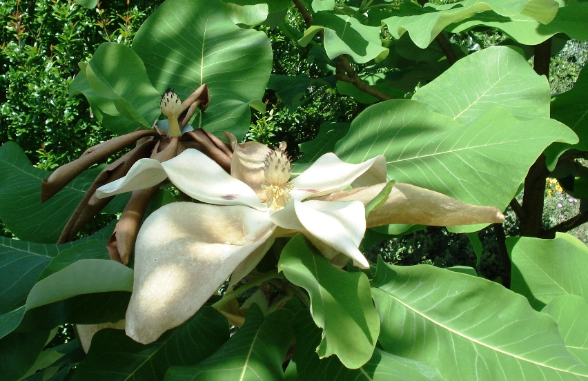 Magnolia_macrophylla_-_open_Blossom